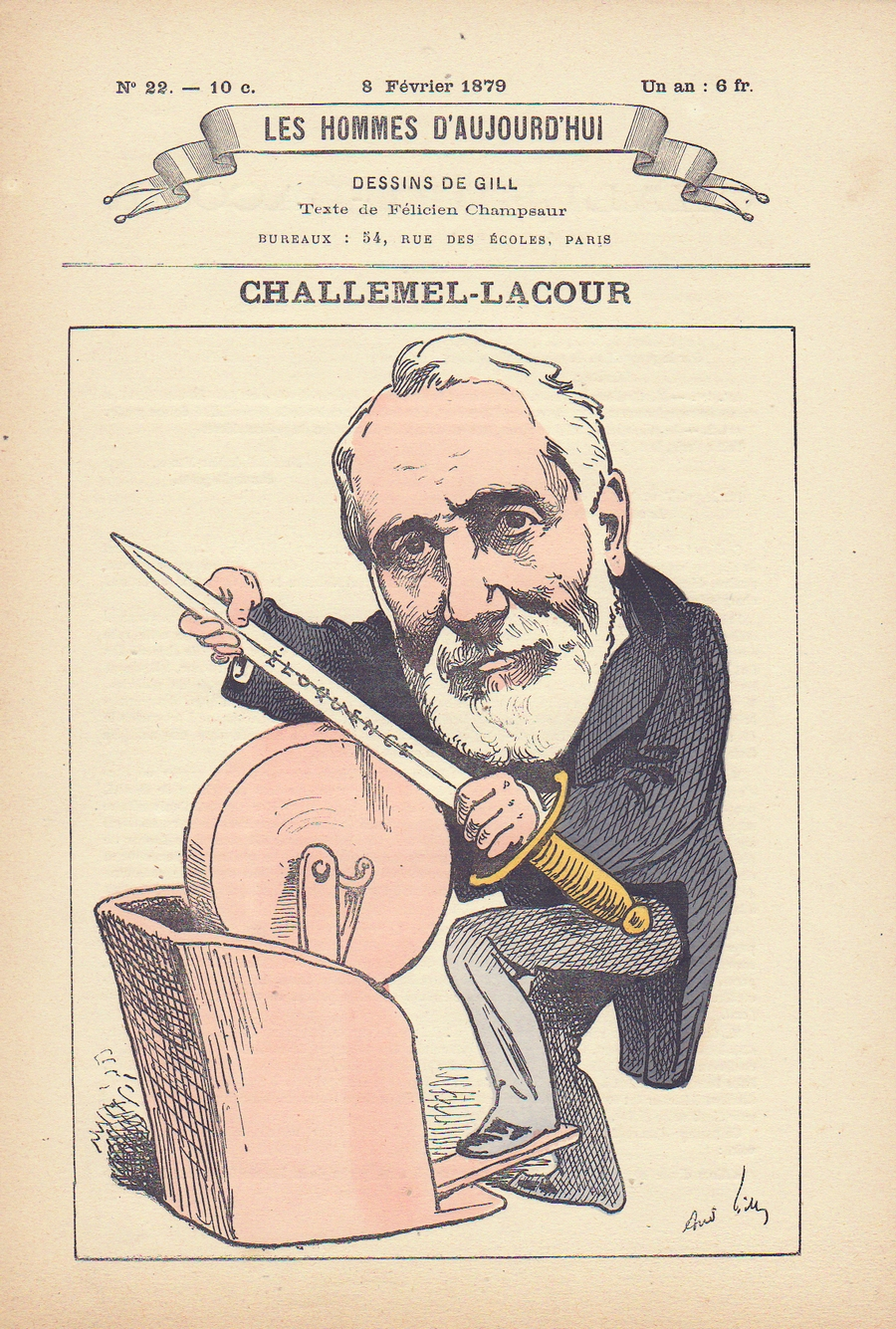 Les Hommes d'aujourd'hui, n°22 (8 février 1879). Caricature de Paul-Armand Challemel-Lacour par André Gill. Scan exemplaire personnel.